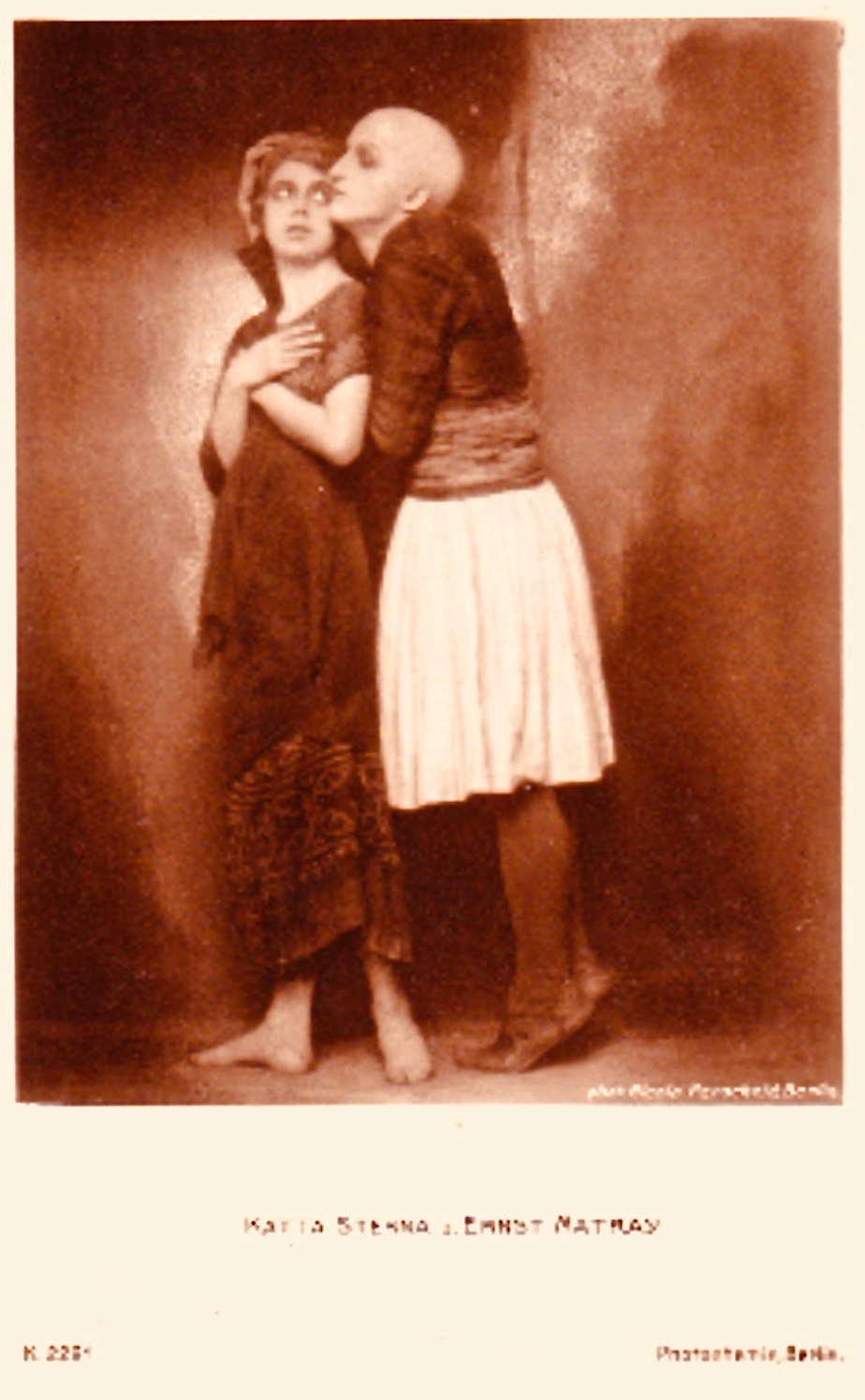 Katharina Stern (1897–1984), Künstlername Katta Sterna, deutsche Tänzerin und Filmdarstellerin, mit dem österreichisch-ungarischen Tänzer, Choreographen, Schauspieler und Filmregisseur Ernst Mátray (1891–1978).